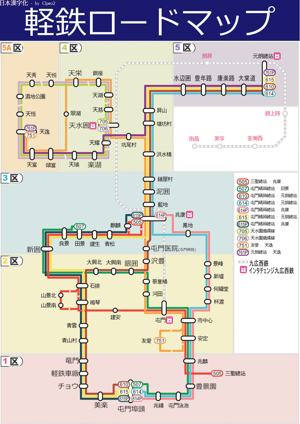 香港九広軽鉄の日語ヴェション